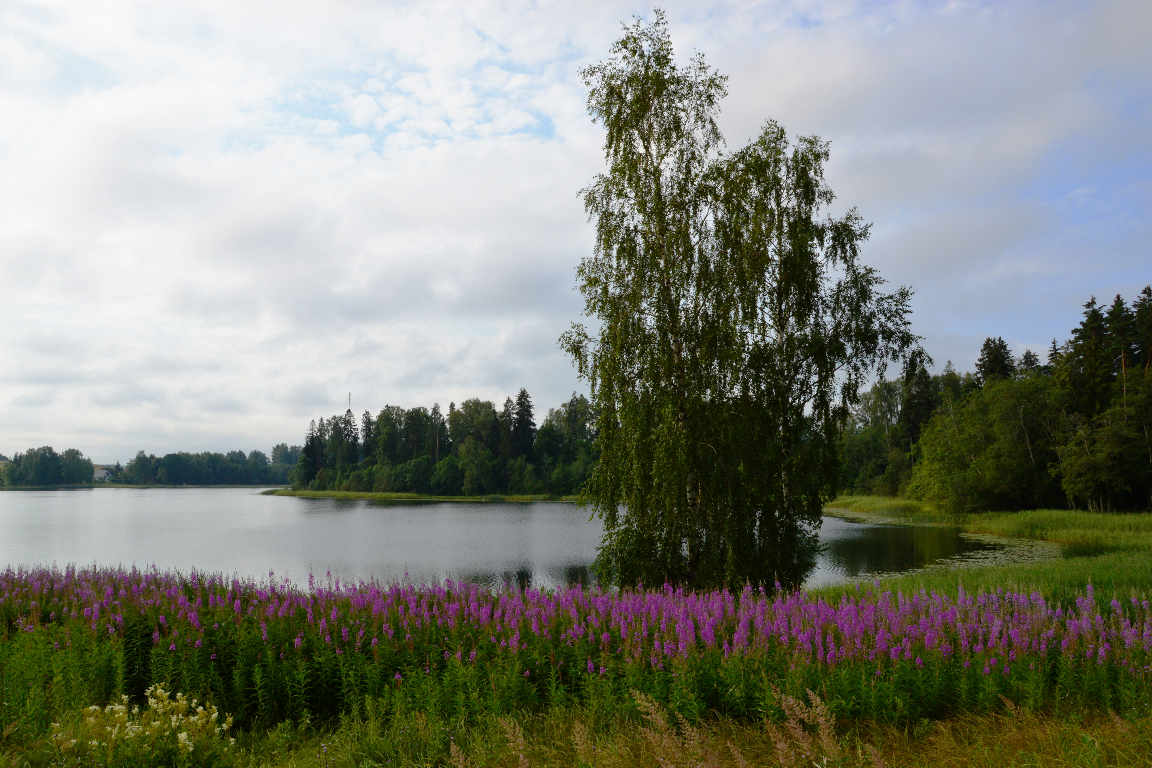 Pangodi järv